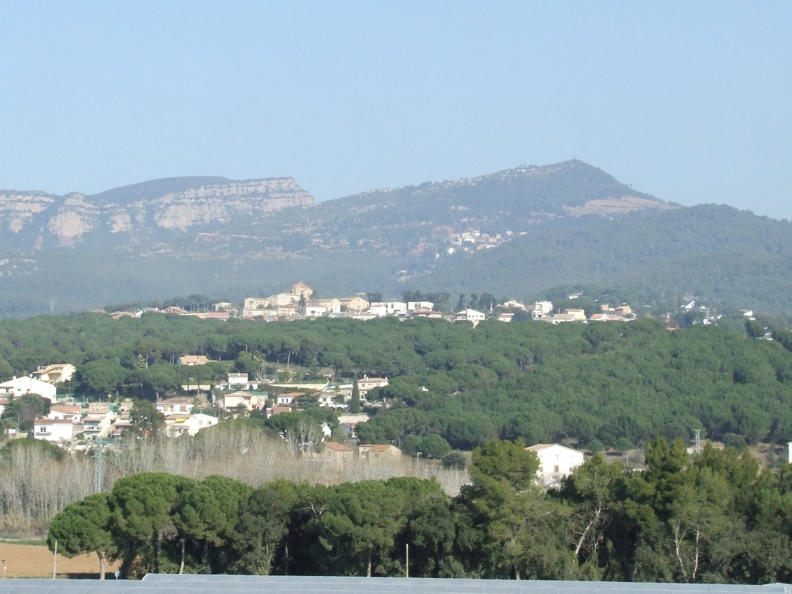 La urbanització del Turó (Bigues, Bigues i Riells, Vallès Oriental)